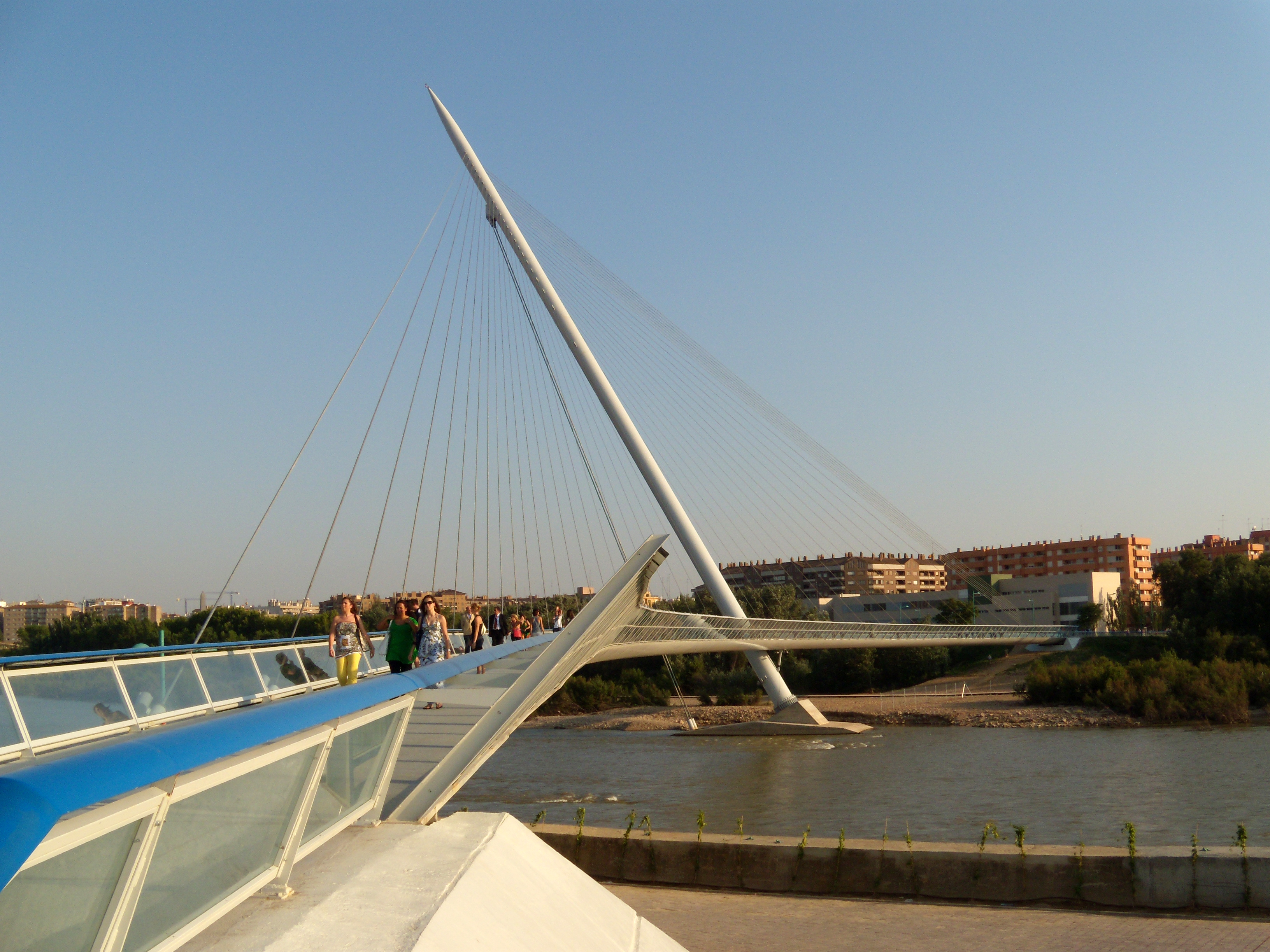 Pasarela del Voluntariado Zaragoza